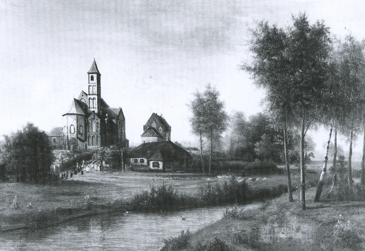 Alte Ansicht des Kirchberges von St. Odilienberg (1858)